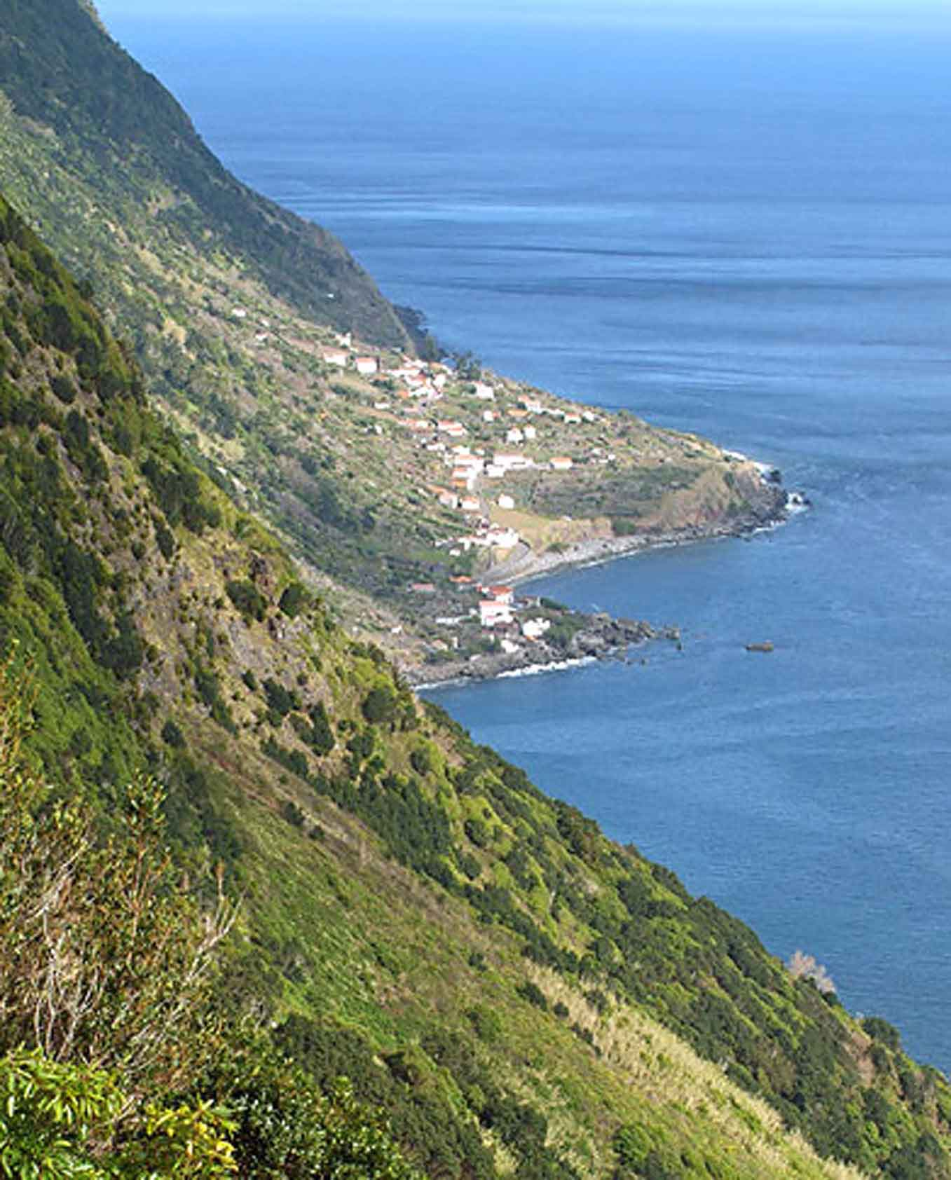 Fajã São João1, ilha de São Jorge, Açores, Portugal.